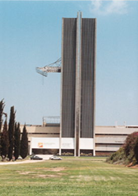 מגדל מדעי